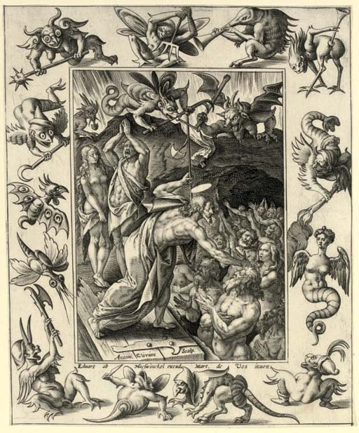 Гравюра Антония Вайрикса II "The Passion" (Страсти) Конец XVI века.По рисунку Мартина де Воса.